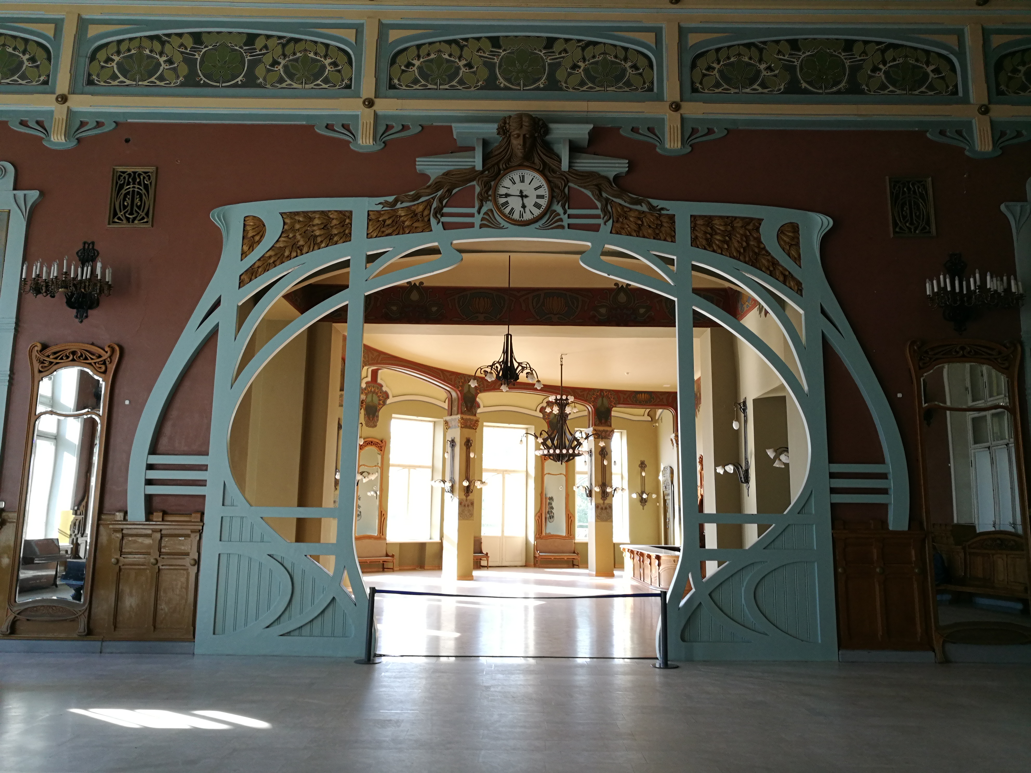 Картинный зал после завершения реставрации, до открытия буфета